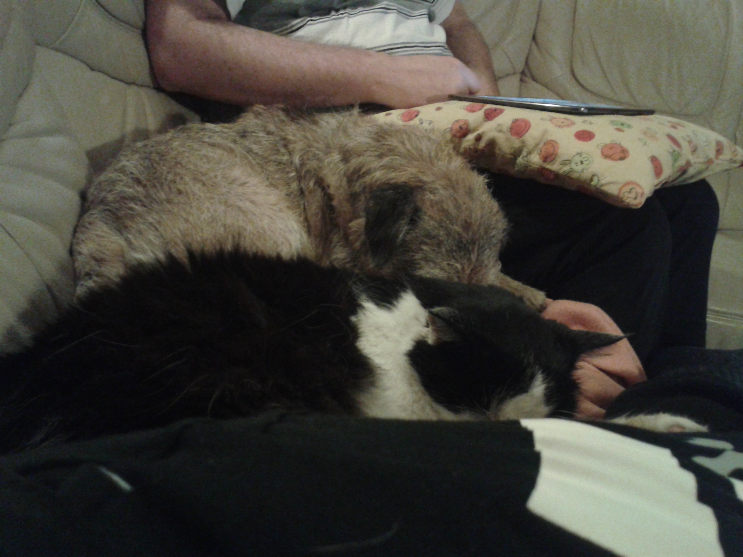 Foulques von Skilos de la Cocagneavec le gros chat.